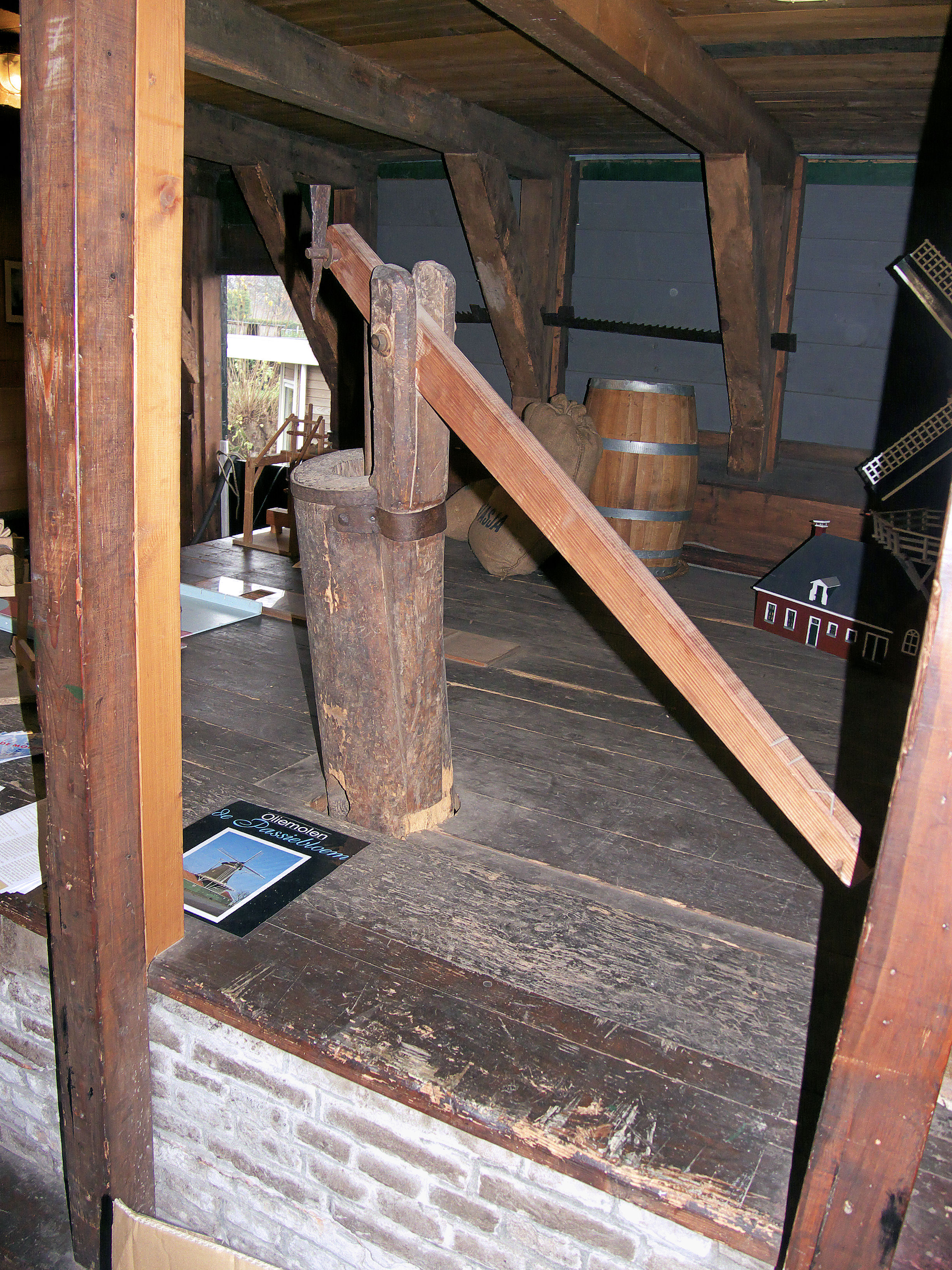 Molen De Passiebloem oliepomp